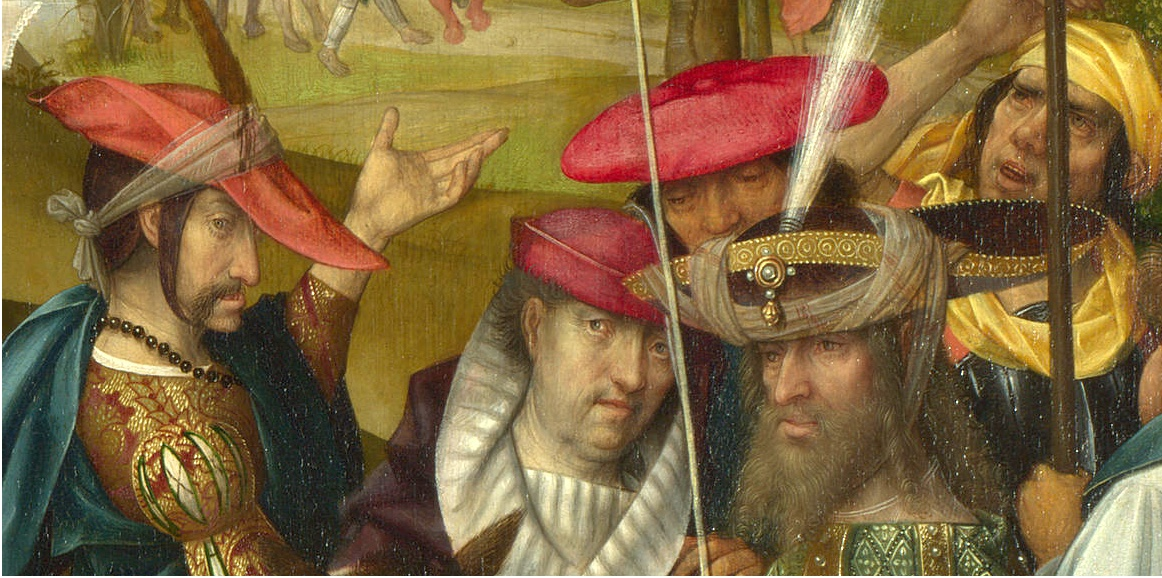 Maître de Delft Crucifixion - National Gallery (détail 2) : Notables dans leurs beaux vêtements